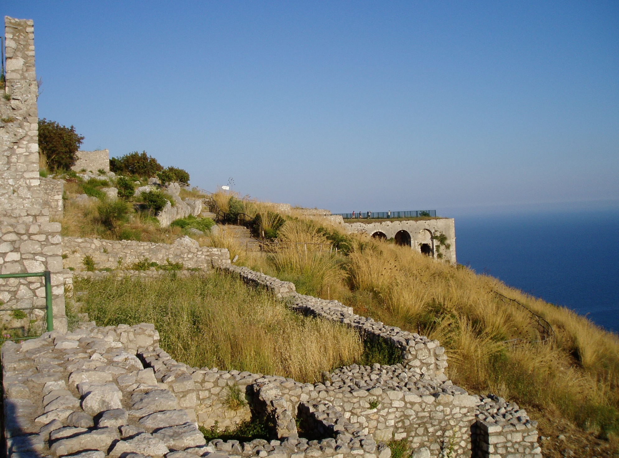 Rozvaliny svatyně S. Angelo na Montegiove